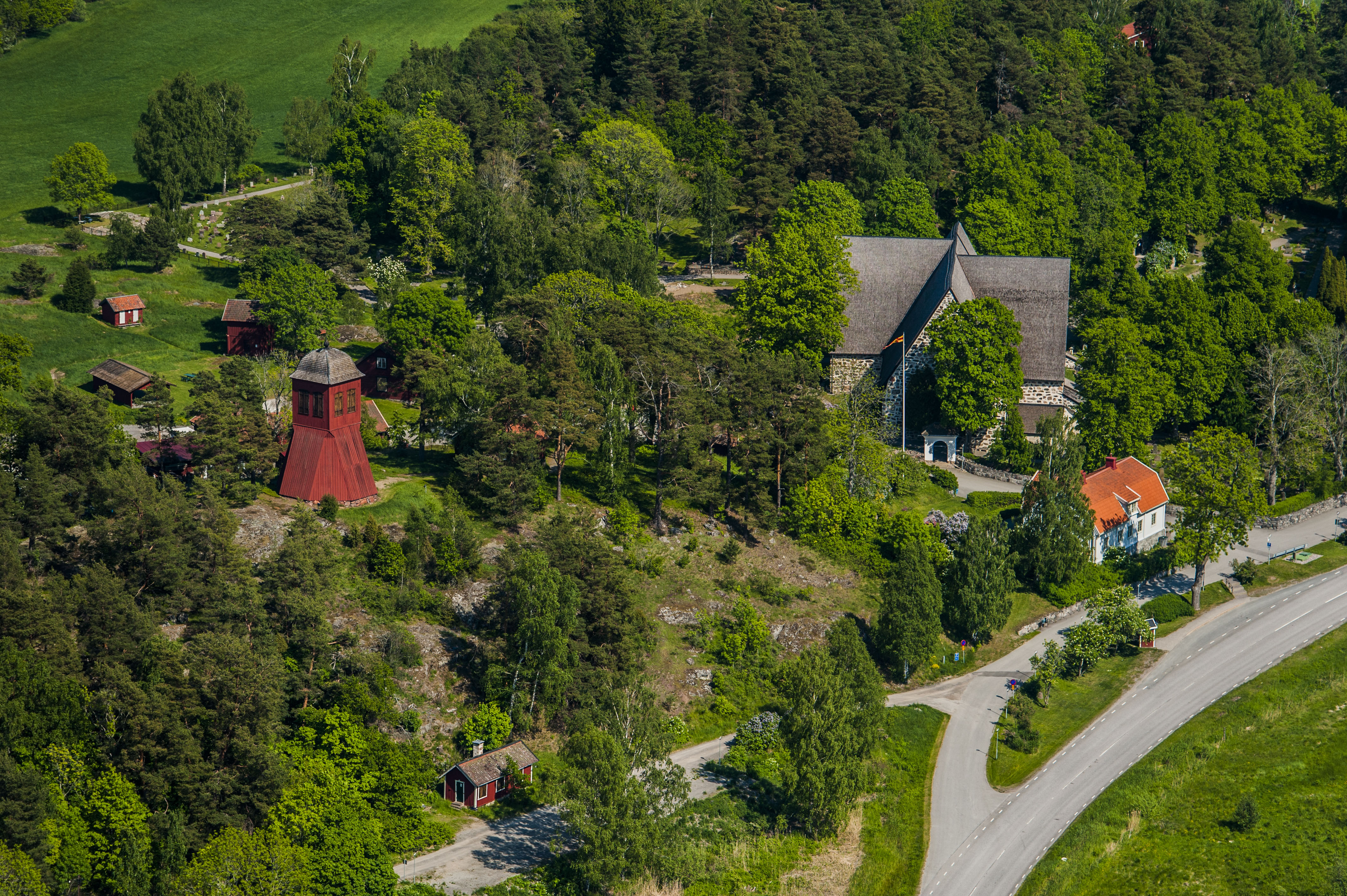 Värmdö ka